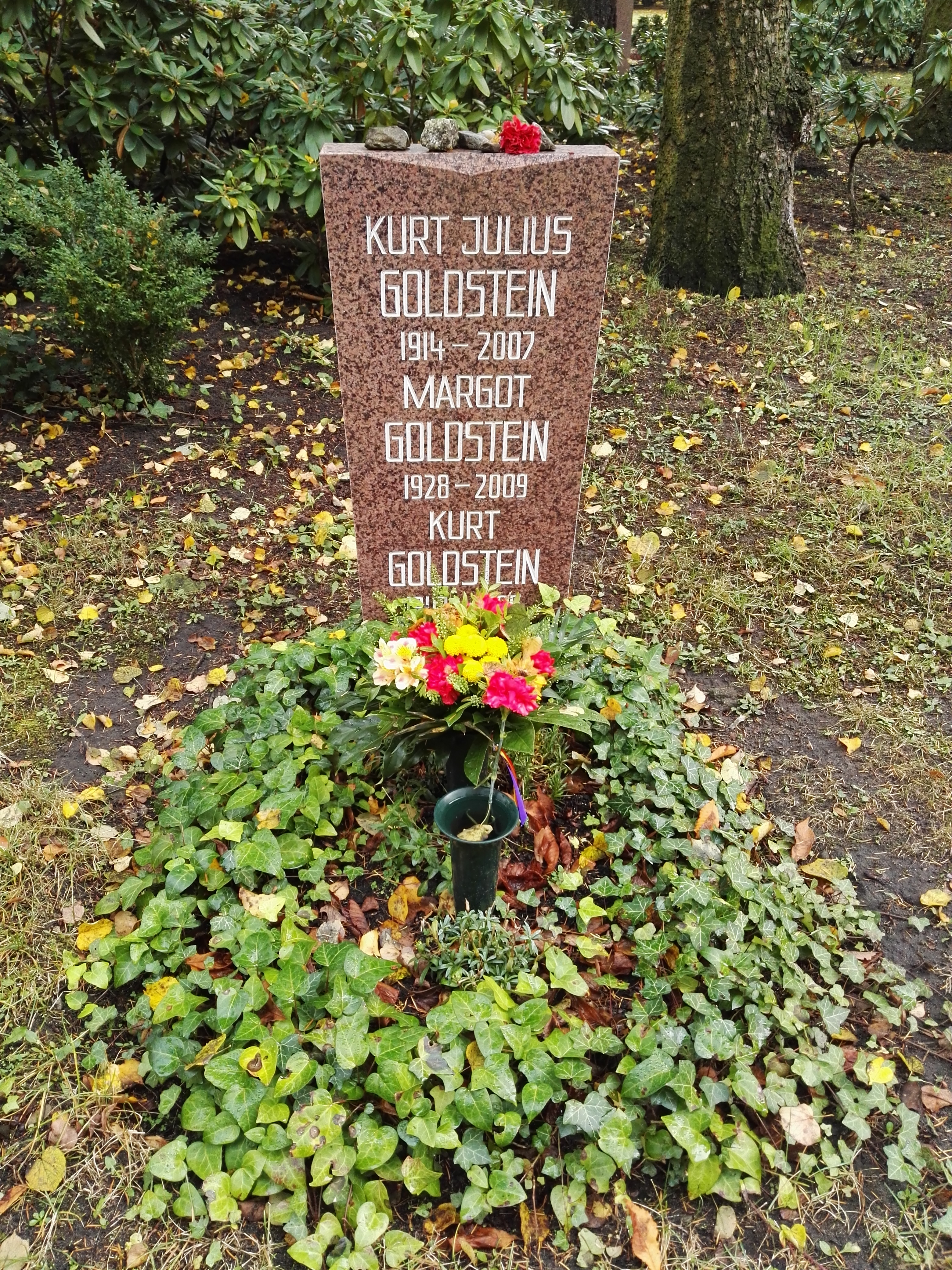 Grab von Kurt Goldstein, Margot Goldstein und Kurt Goldsteinauf dem Sozialistenfriedhof des Zentralfriedhofs Friedrichsfelde